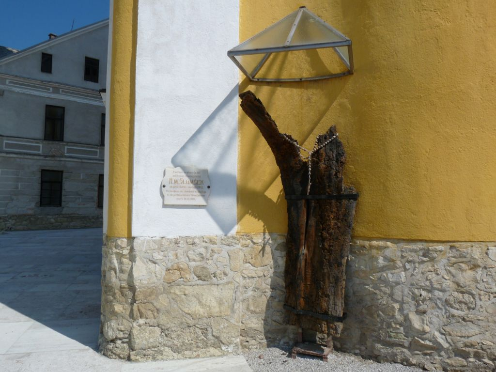 Pod tem orehom je bil odlikovan dvanajstletni A. M. Slomšek ob prvi šolski skušnji l. 1812